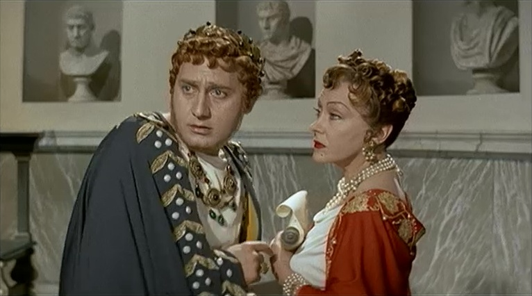 Scena del film Mio figlio Nerone